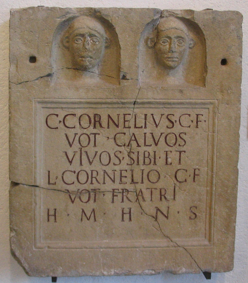 Stele antico-romana di due fratelli della Gens Cornelia, nell'ex Museo Archeologico di Bergamo. CIL V 5154. Foto di Giorces.